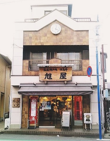 神戸牛老舗 旭屋